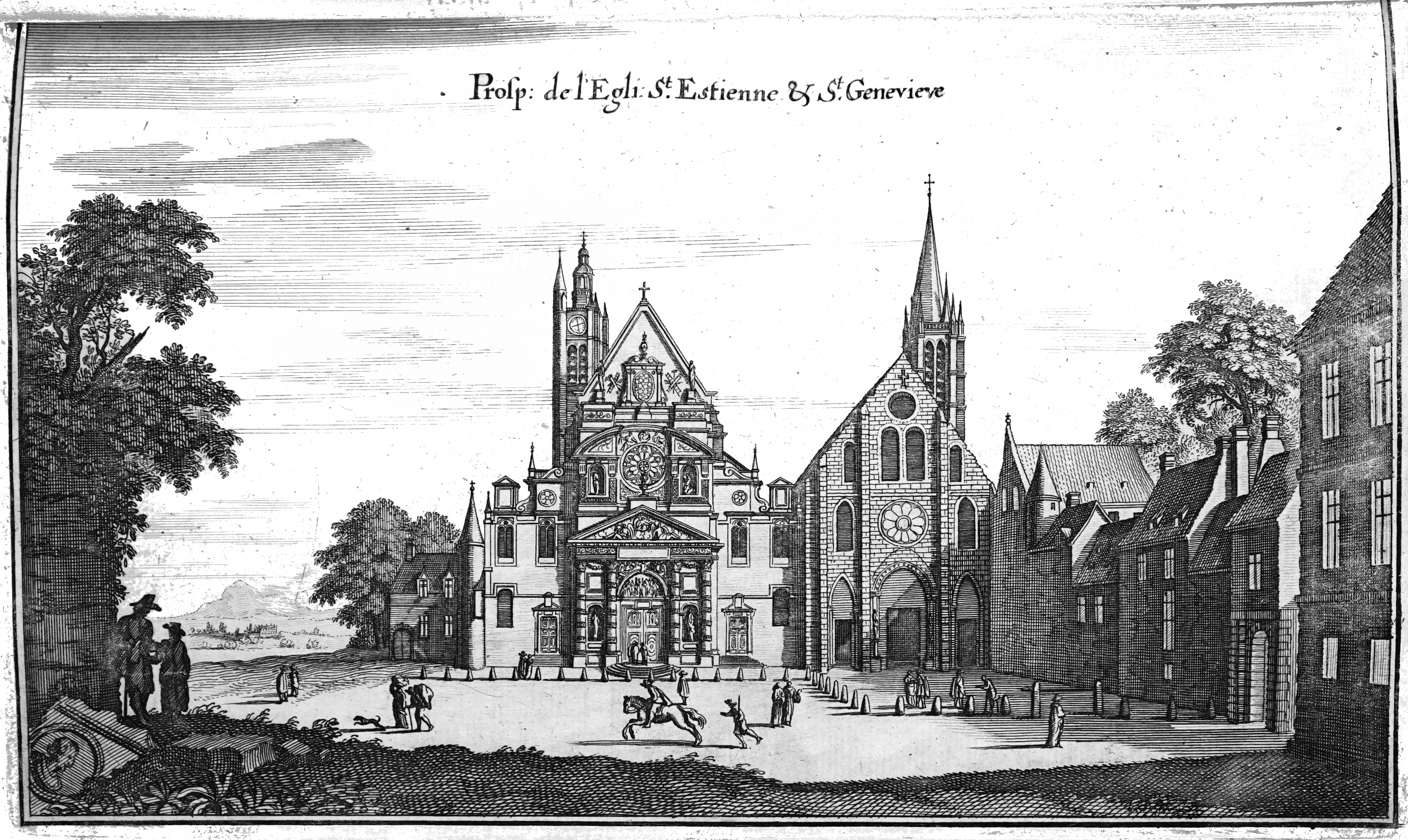 image extraite du livre.